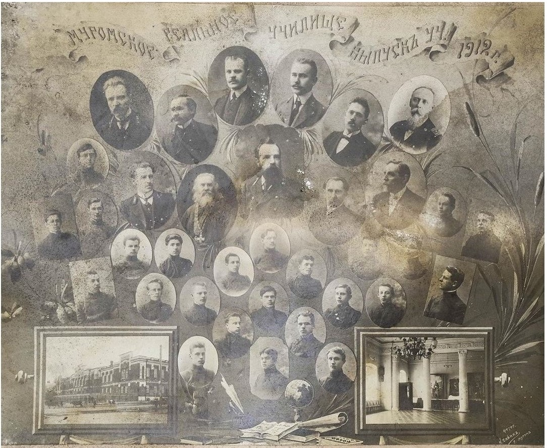 Выпускники Муромского реального училища 1912 года